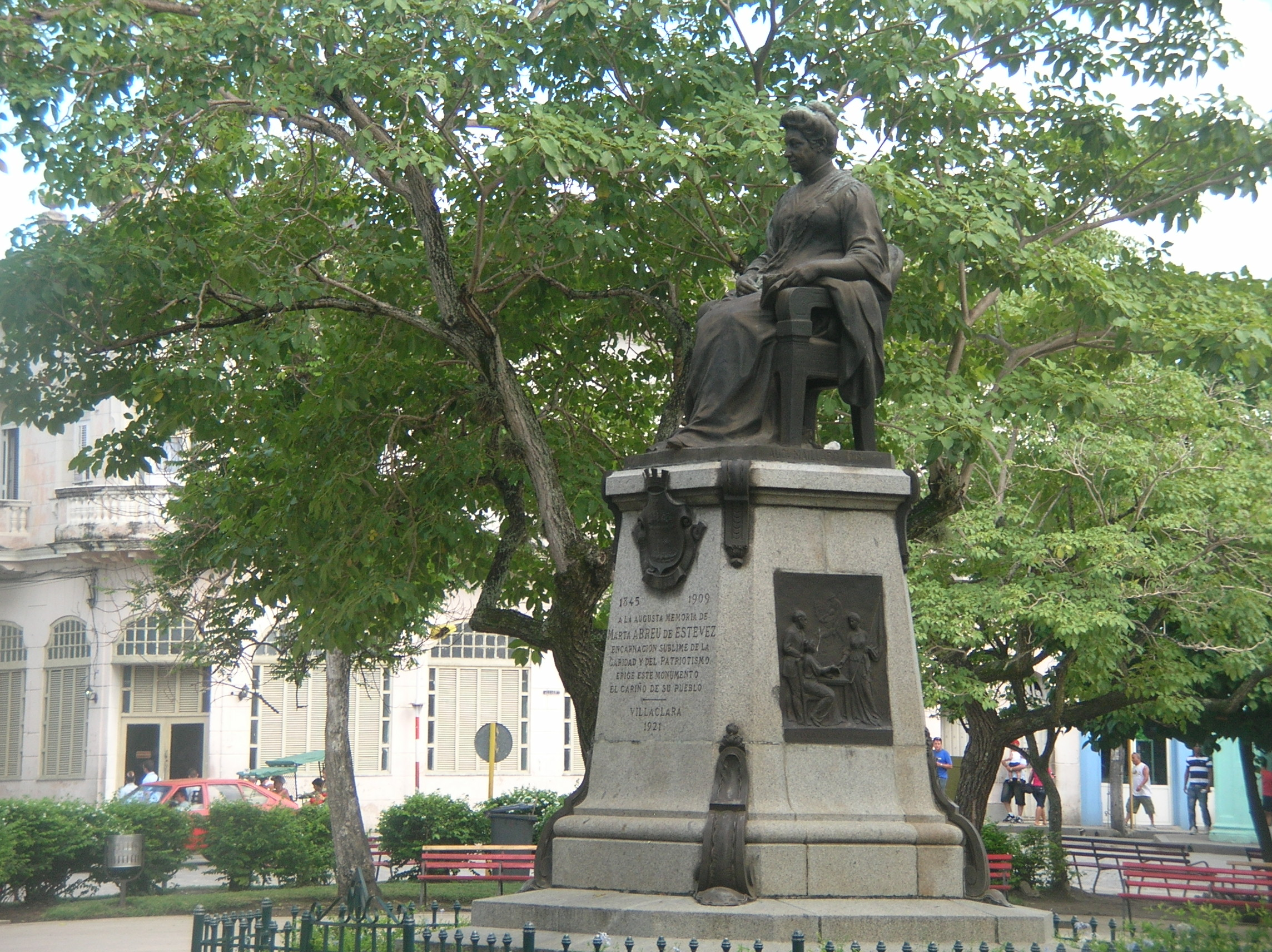 Estatua